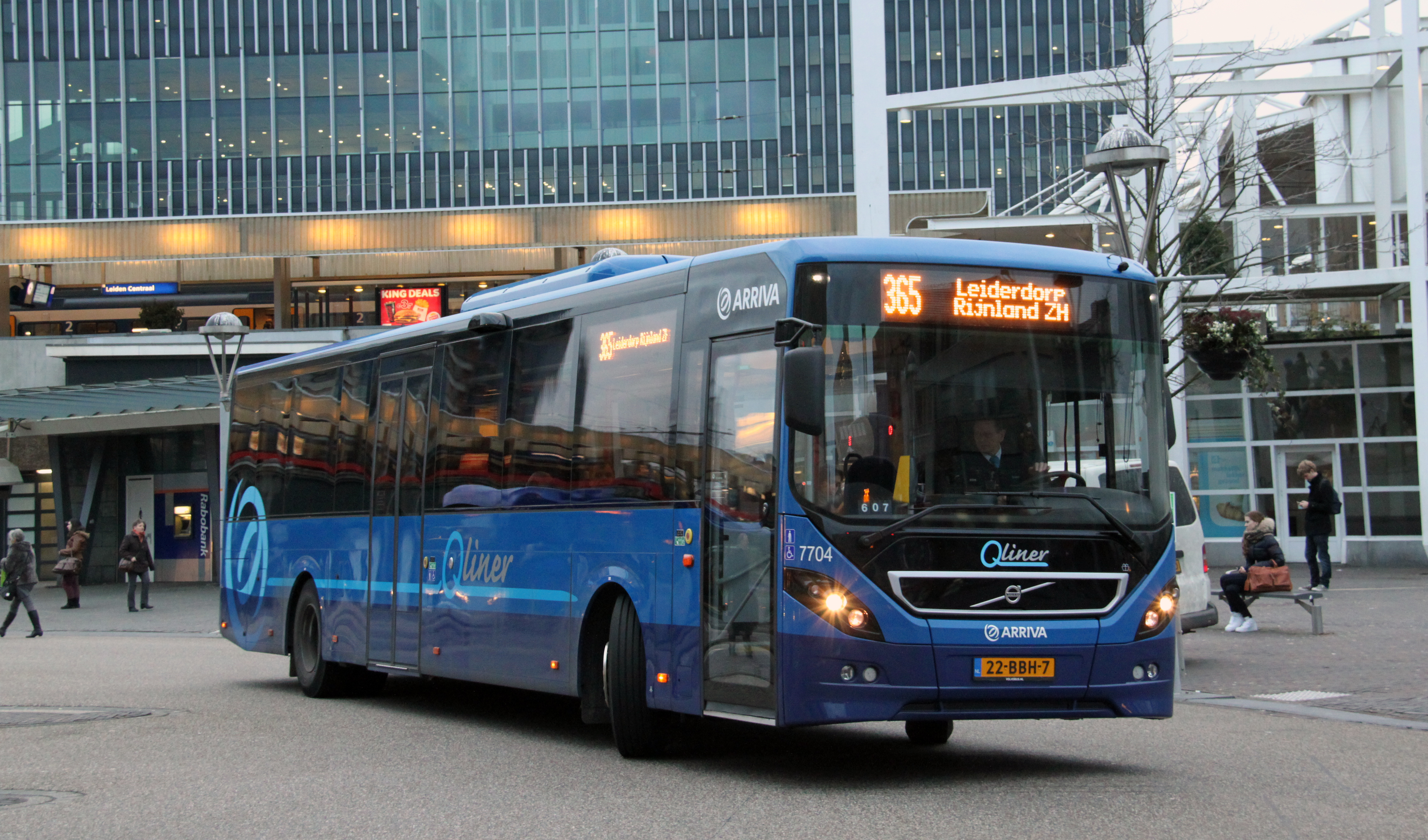 Een Qliner serie 7700 van Arriva op het busstation van Leiden Centraal.